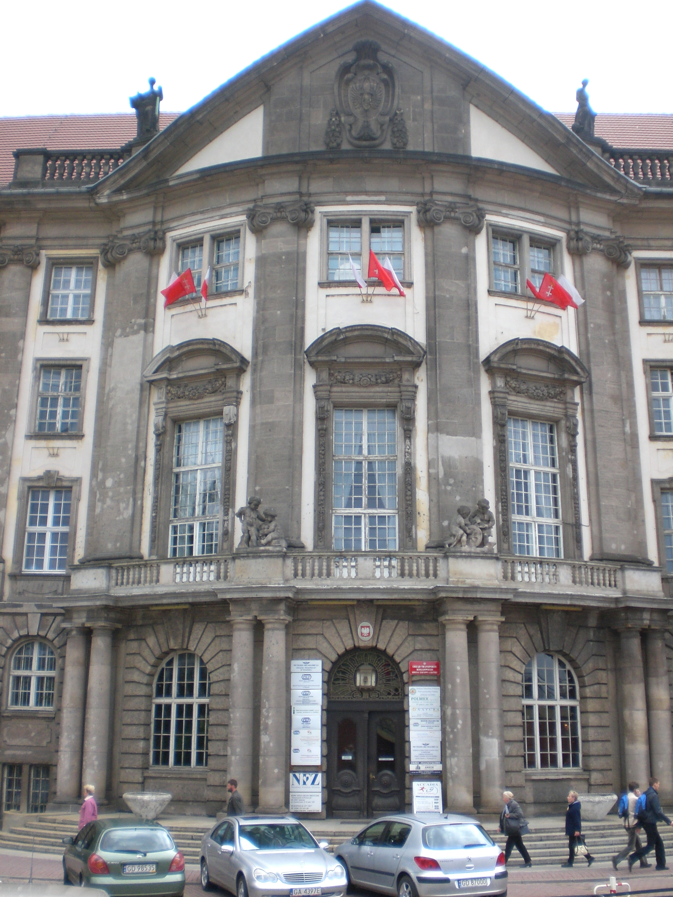 Regionalna Dyrekcja Kolejowa w Gdańsku